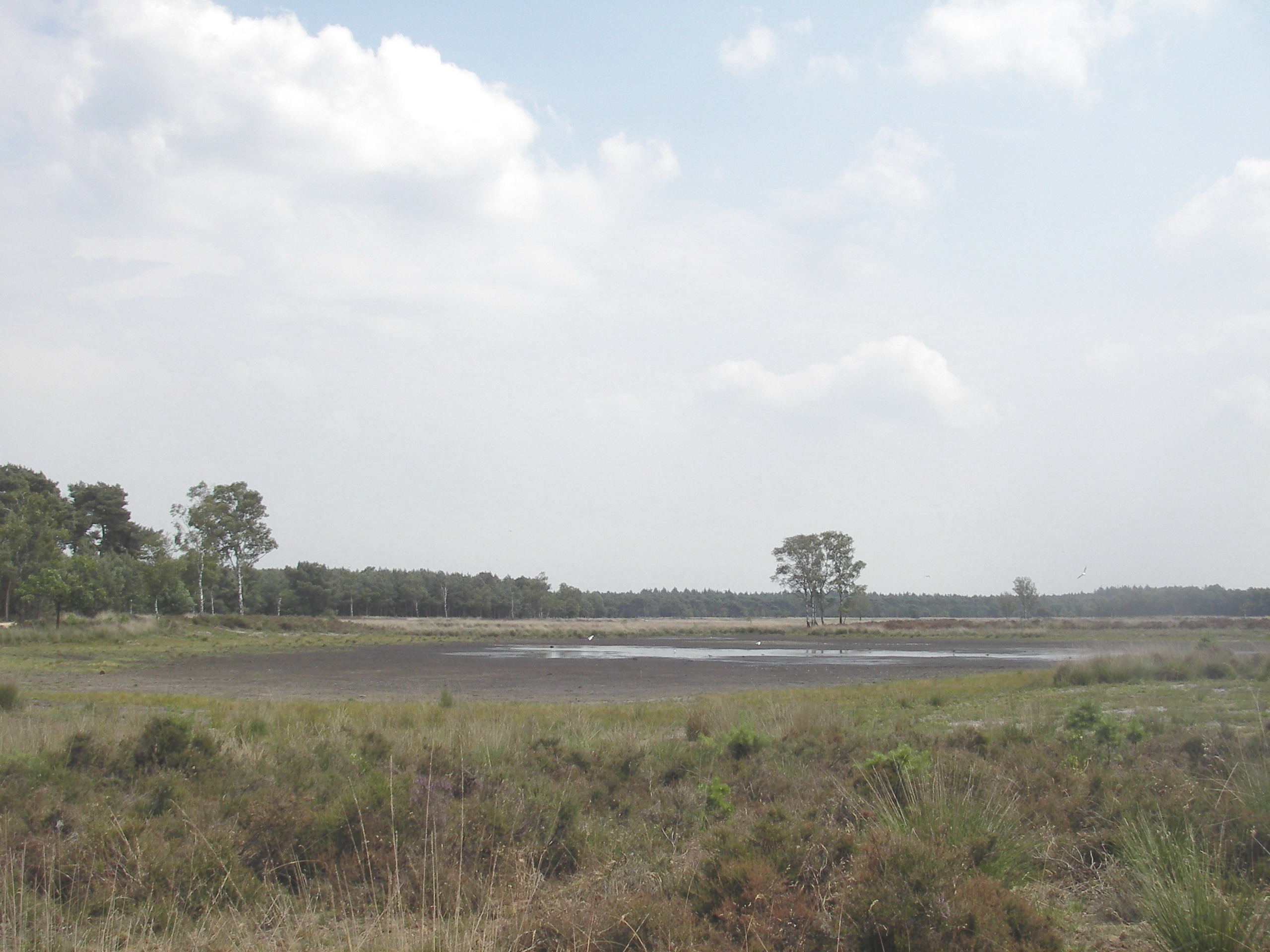 Droogvallend vennetje op de Strabrechtse heide.